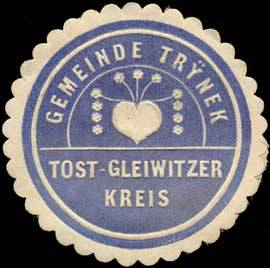 Sealing stamp Title: Gemeinde Trynek - Tost-Gleiwitzer Kreis Description: blau, weiß, geprägt Place: Trynek/Schlesien size: 4 cm